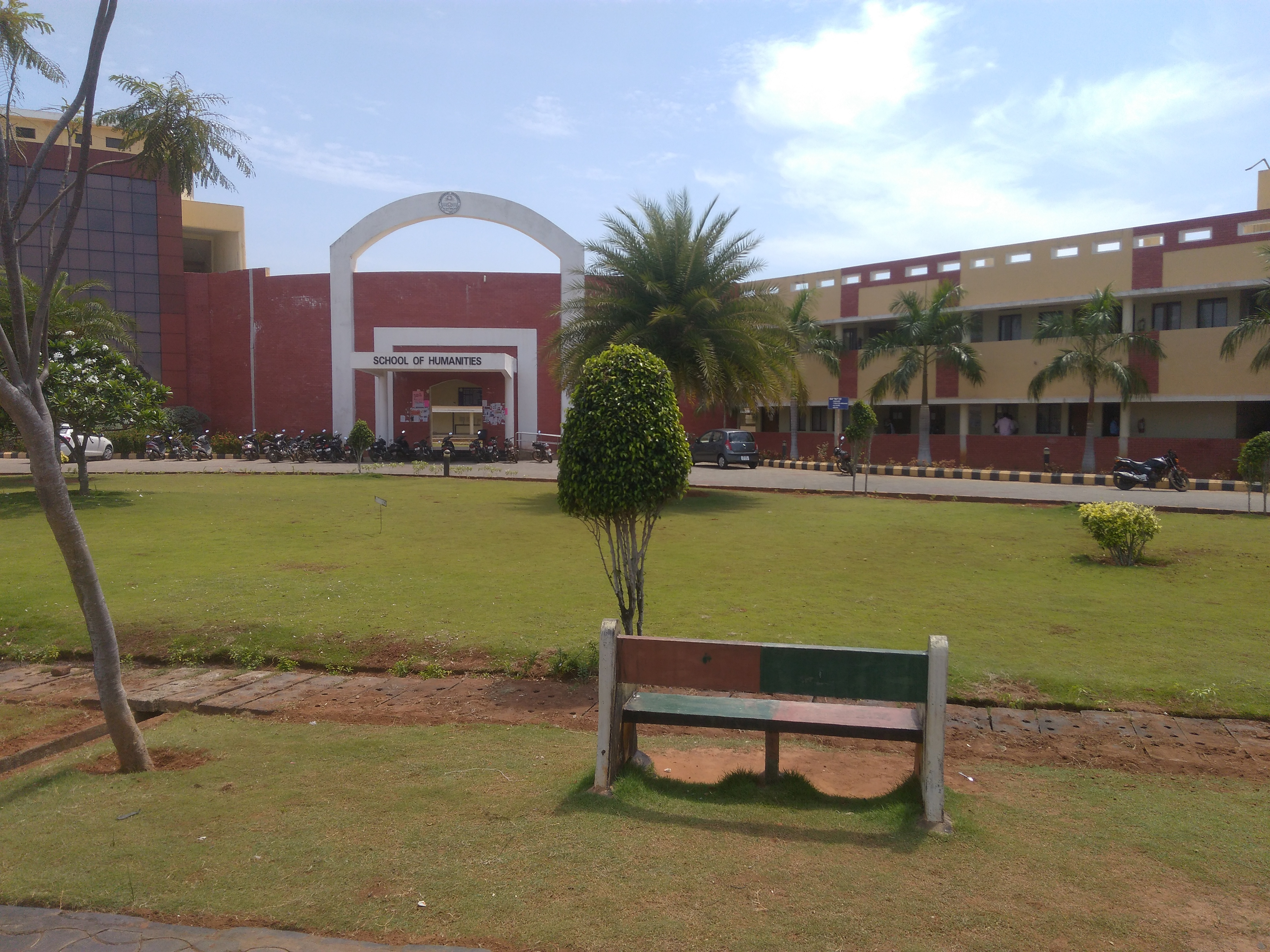 స్కూల్ ఆఫ్ హుమనిటీస్